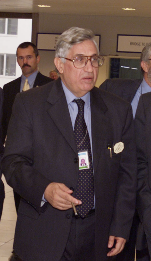 Antonio Fazio, Governor of Banca d'Italia